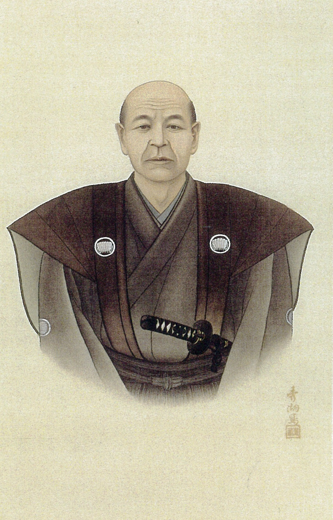 幕末の彦根藩士・宇津木景福（六之丞）の肖像画。